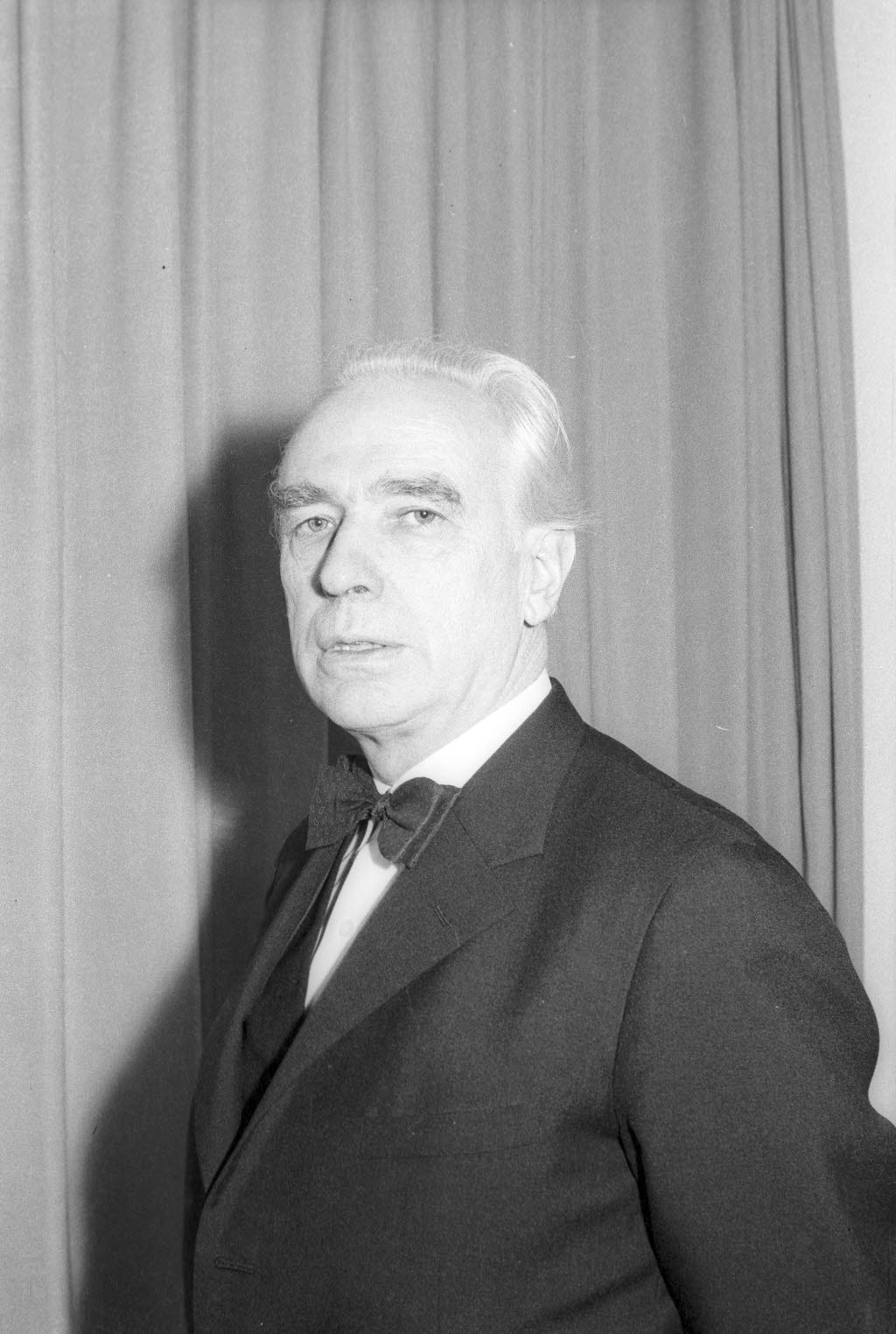 Der dänische Historiker hält als Auftakt im neuen Gebäude der Deutsch-Nordischen Burse den Vortrag "Deutschland und der Norden". Ihm wird kurz darauf der Kieler Kulturpreis für 1971 zuerkannt.